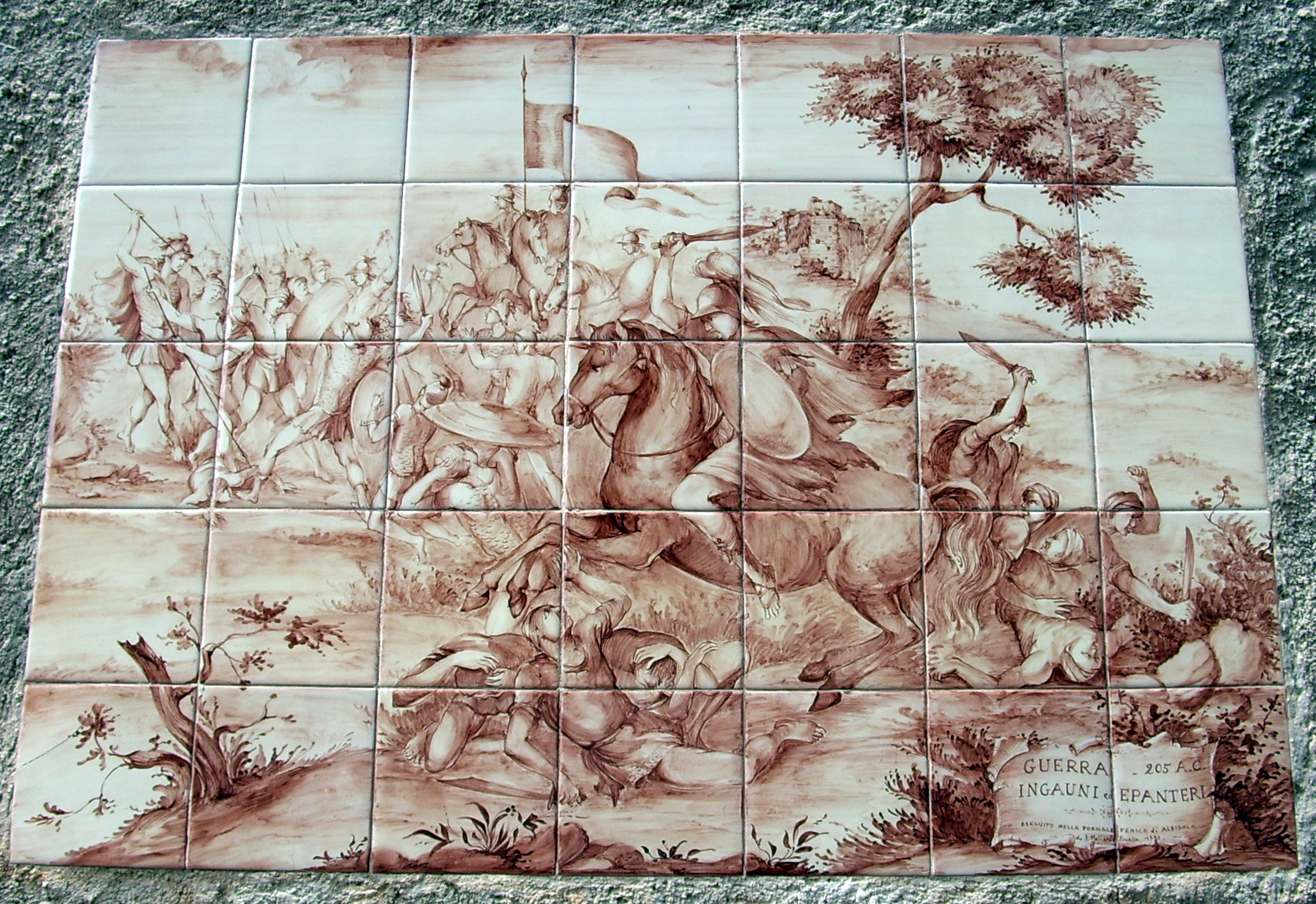 Raffigurazione in ceramica presso Bardineto, Liguria, Italia